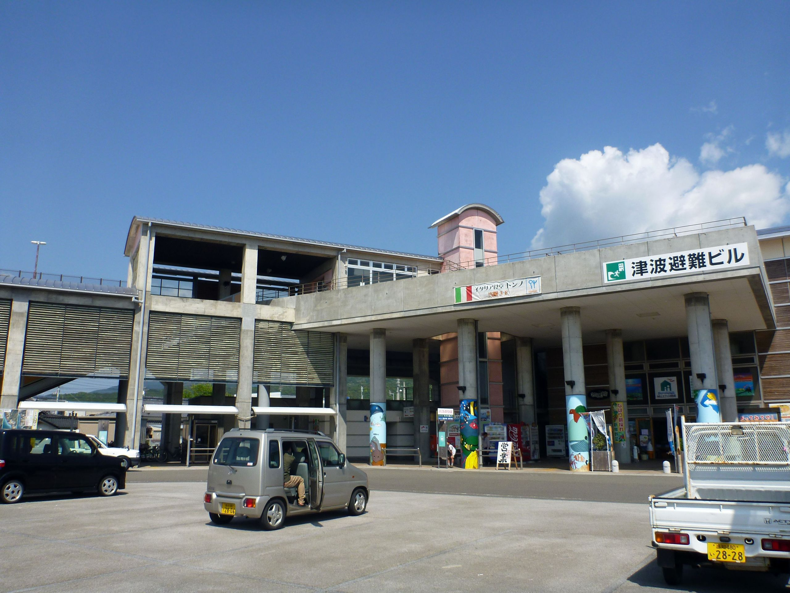 Tosa Kuroshio Railway Nahari Station